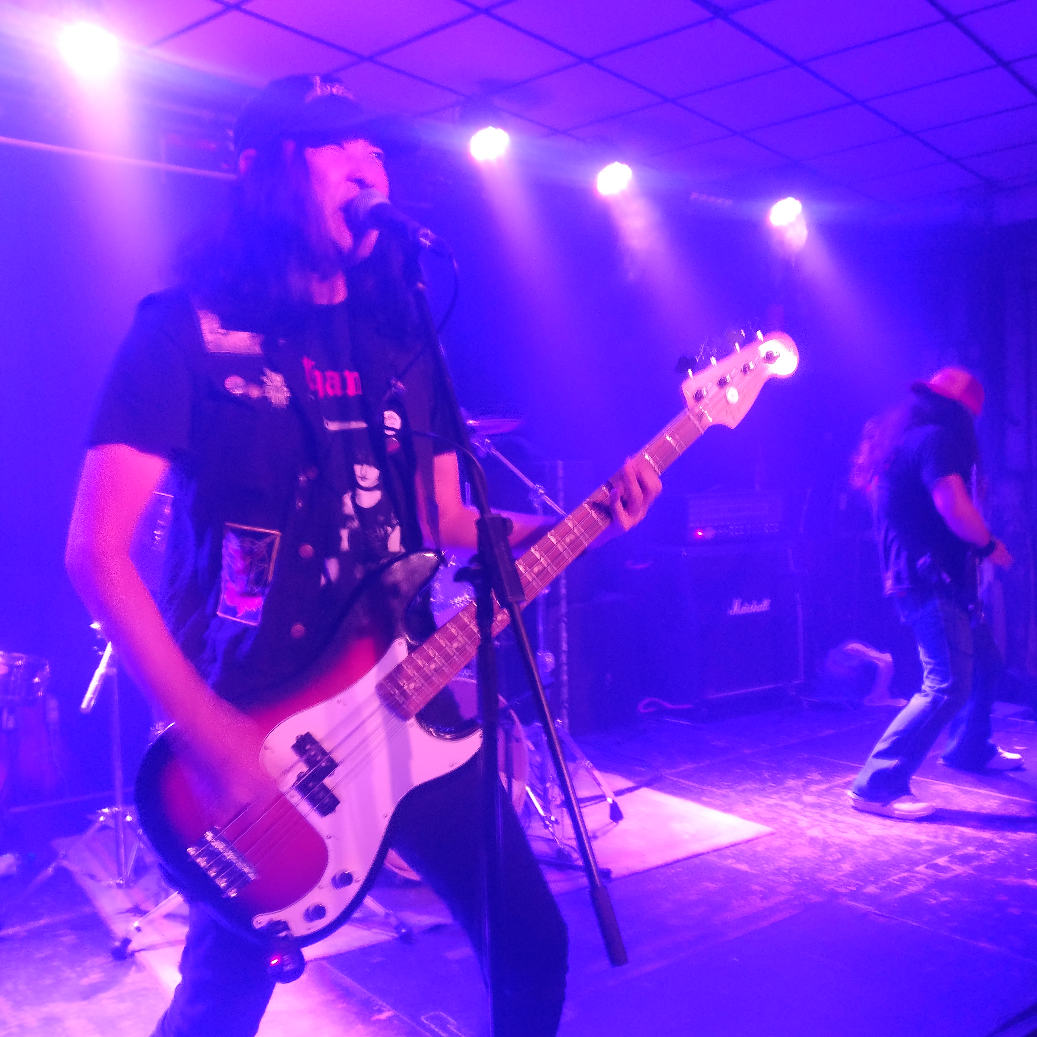 Abigail sur scène au bar L'Anti à Québec en 2018